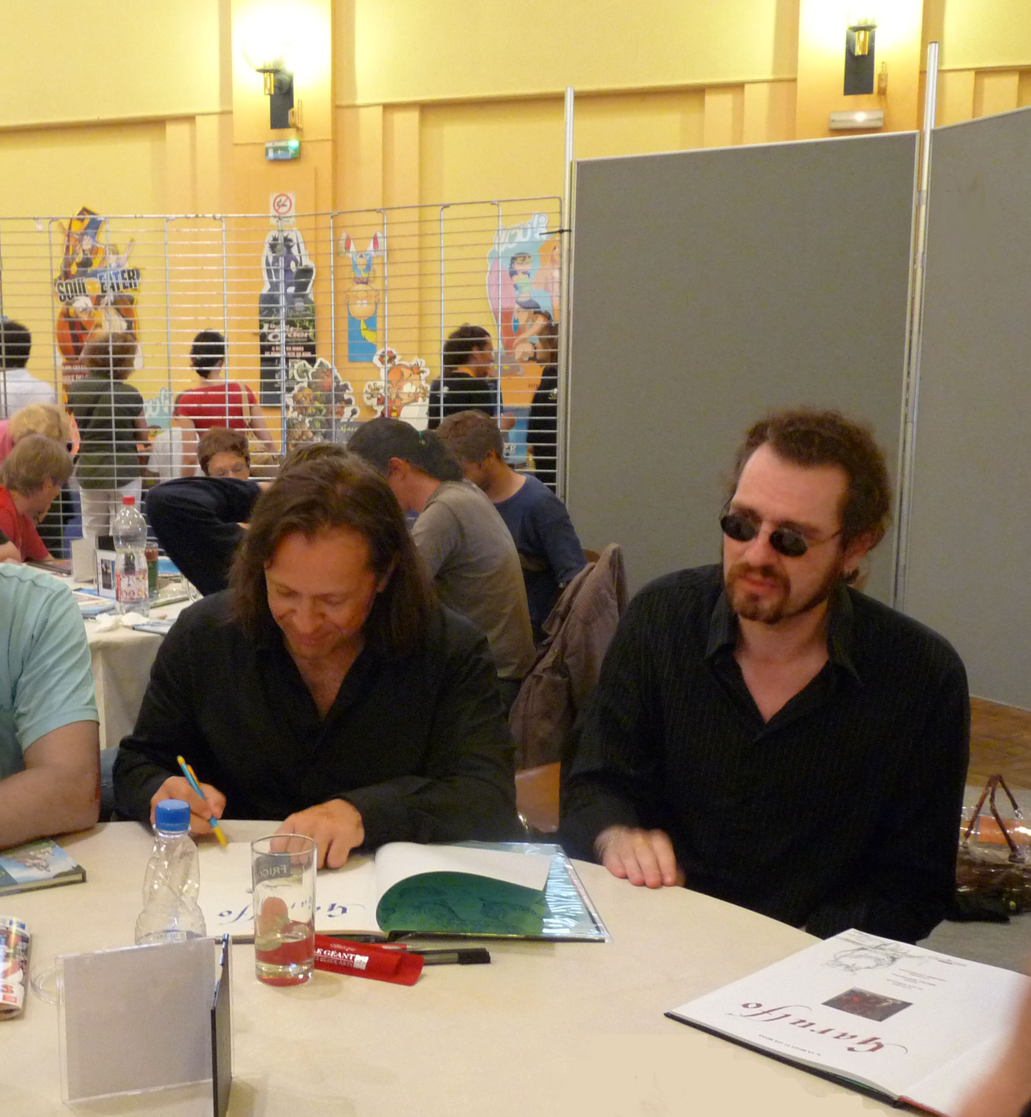 Table-ronde de dédicaces avec Alain Ayroles et Bruno Maïorana (Garulfo) lors du Festival européen de la bande dessinée Strasbulles 2009